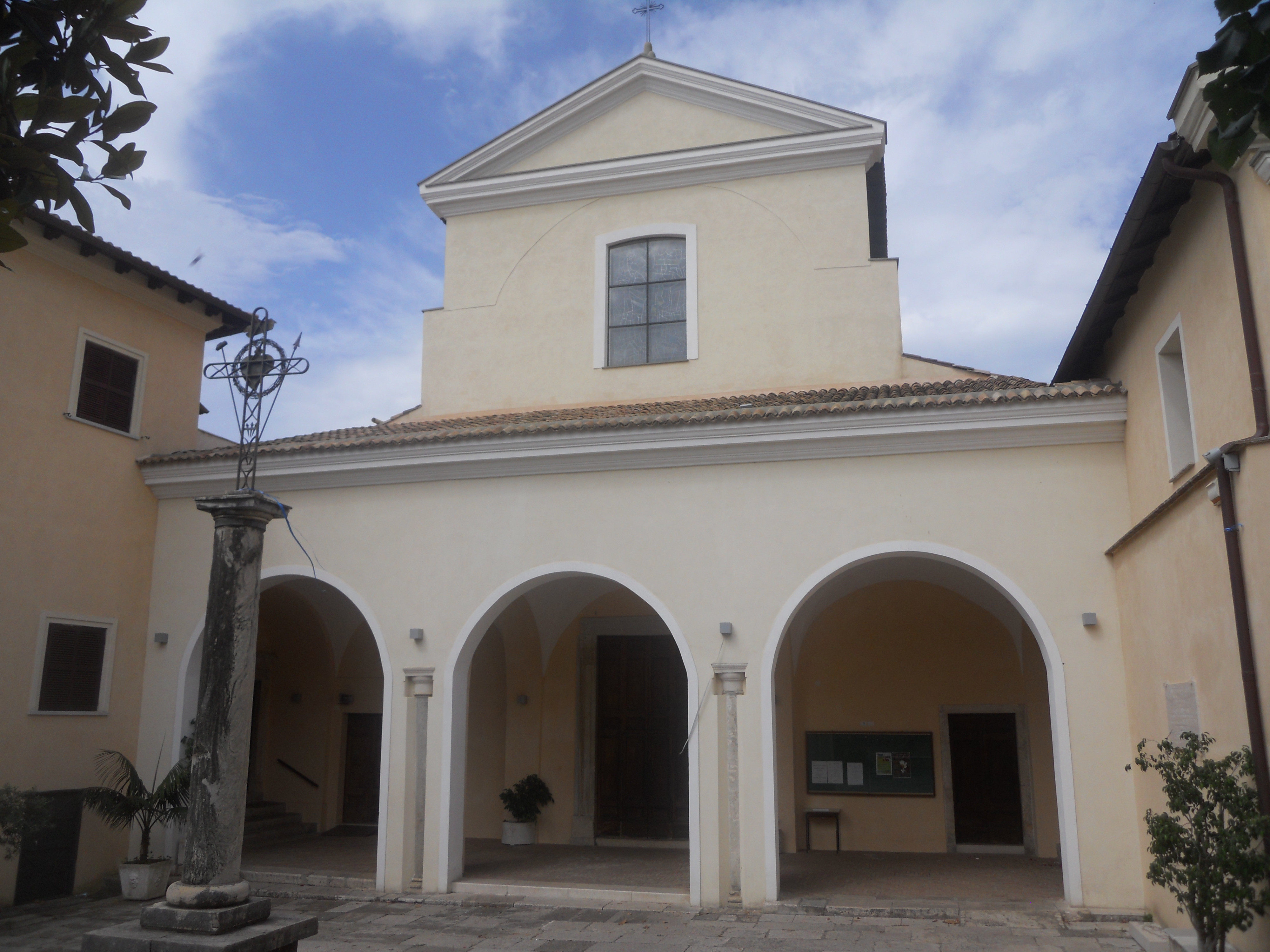 La facciata a salienti con portico della chiesa di Sant'Erasmo in Formia.